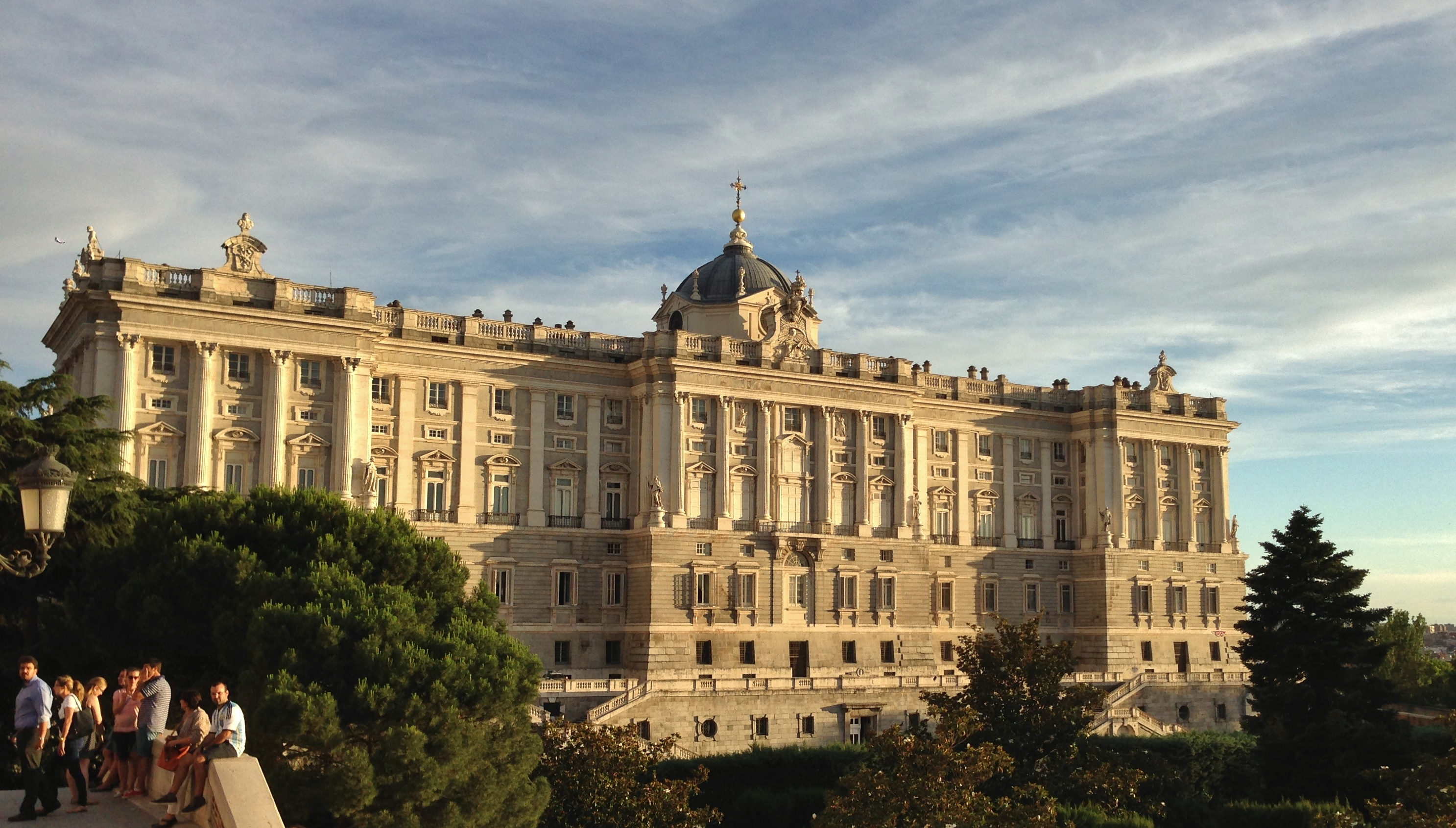 Royal Palace